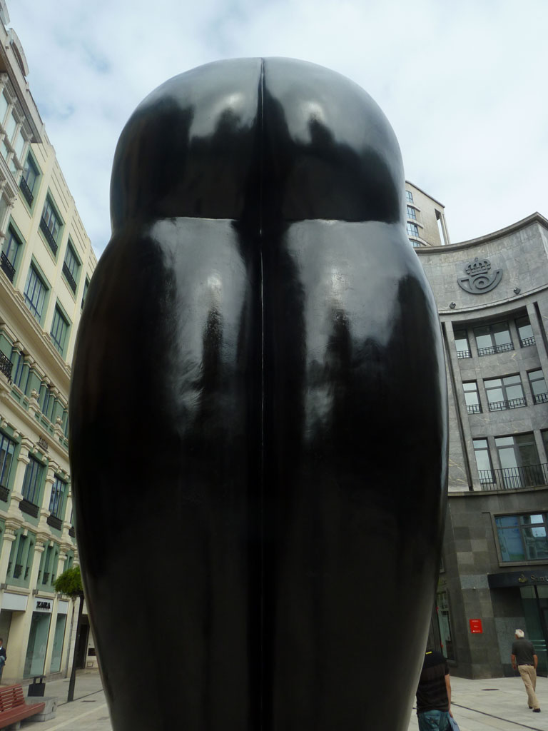 Autor.- Eduardo Úrculo, 2001 Calle Pelayo. Oviedo.